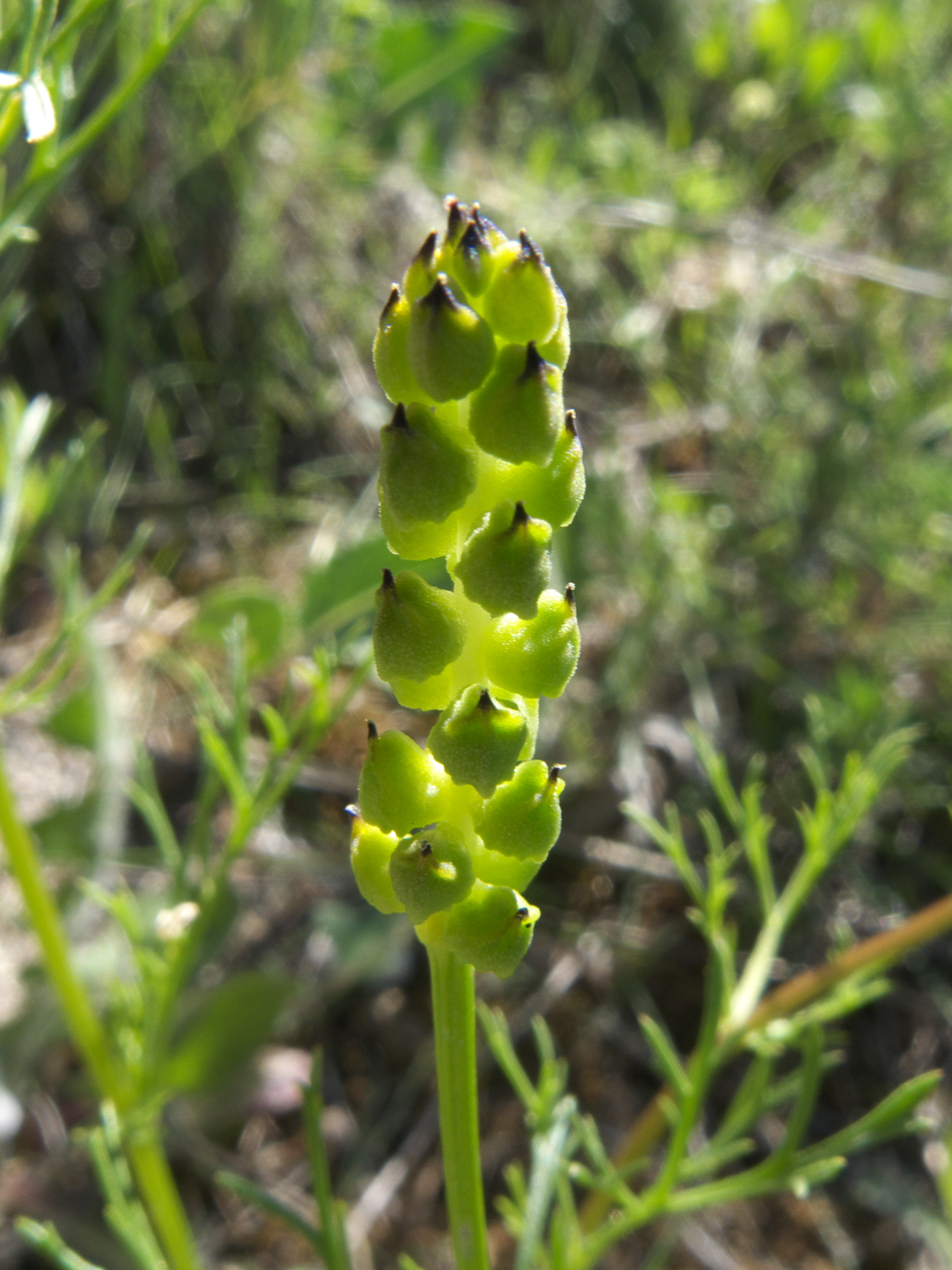 Frutos de Adonis flammea (Rivas Vaciamadrid, Madrid)